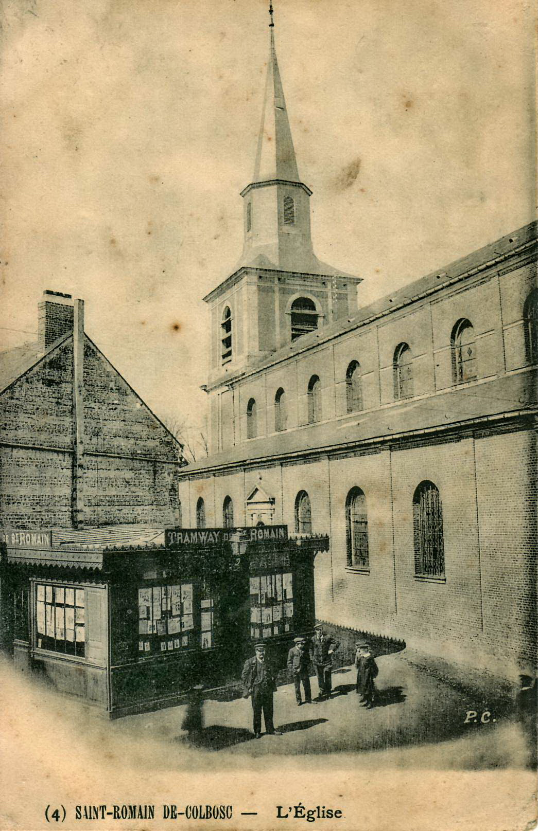 Carte postale ancienne éditée par P. C. n°4 SAINT-ROMAIN-DE-COLBOSC - L'église Vue en gros plan du kiosque de la station terminale du Tramway de Saint-Romain-de-Colbosc